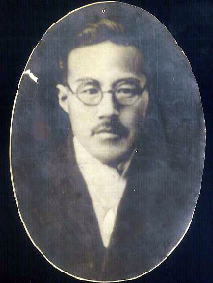 黃尙奎황상규